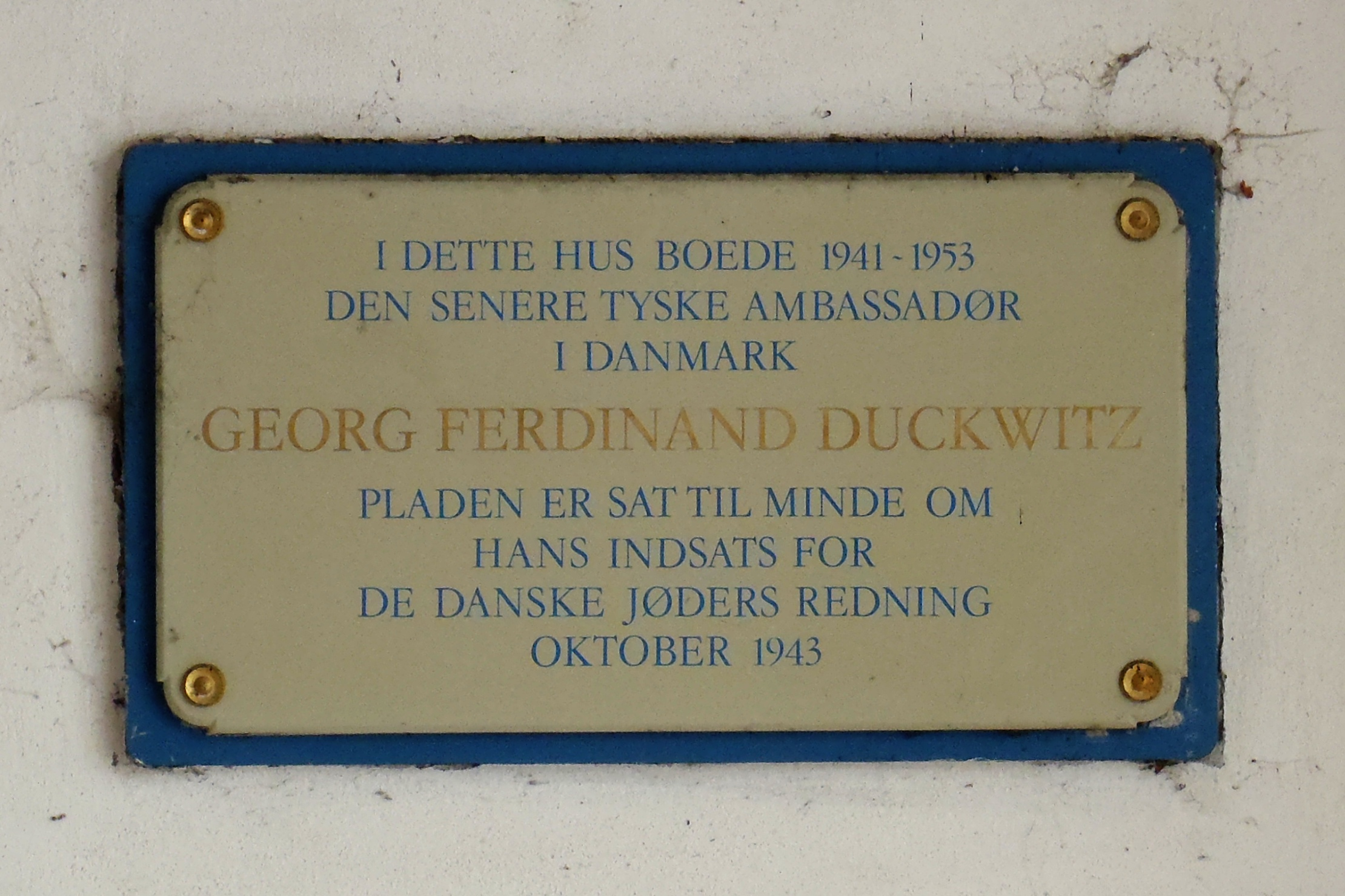 Mindeplade for Georg Ferdinand Duckwitz på landstedet Frieboeshvile, Lyngby Hovedgade 2, Kongens Lyngby.